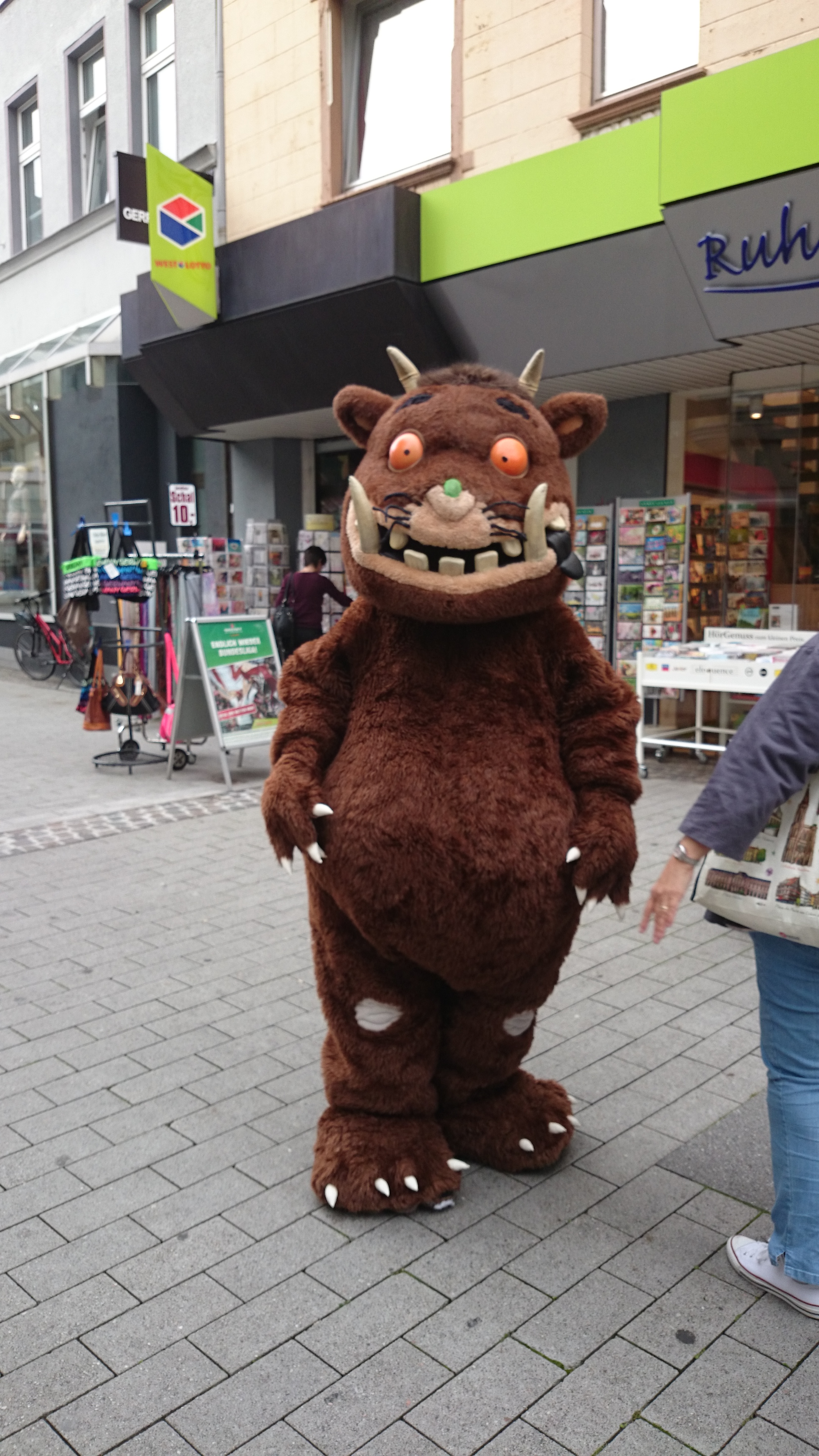 Der Grüffelo